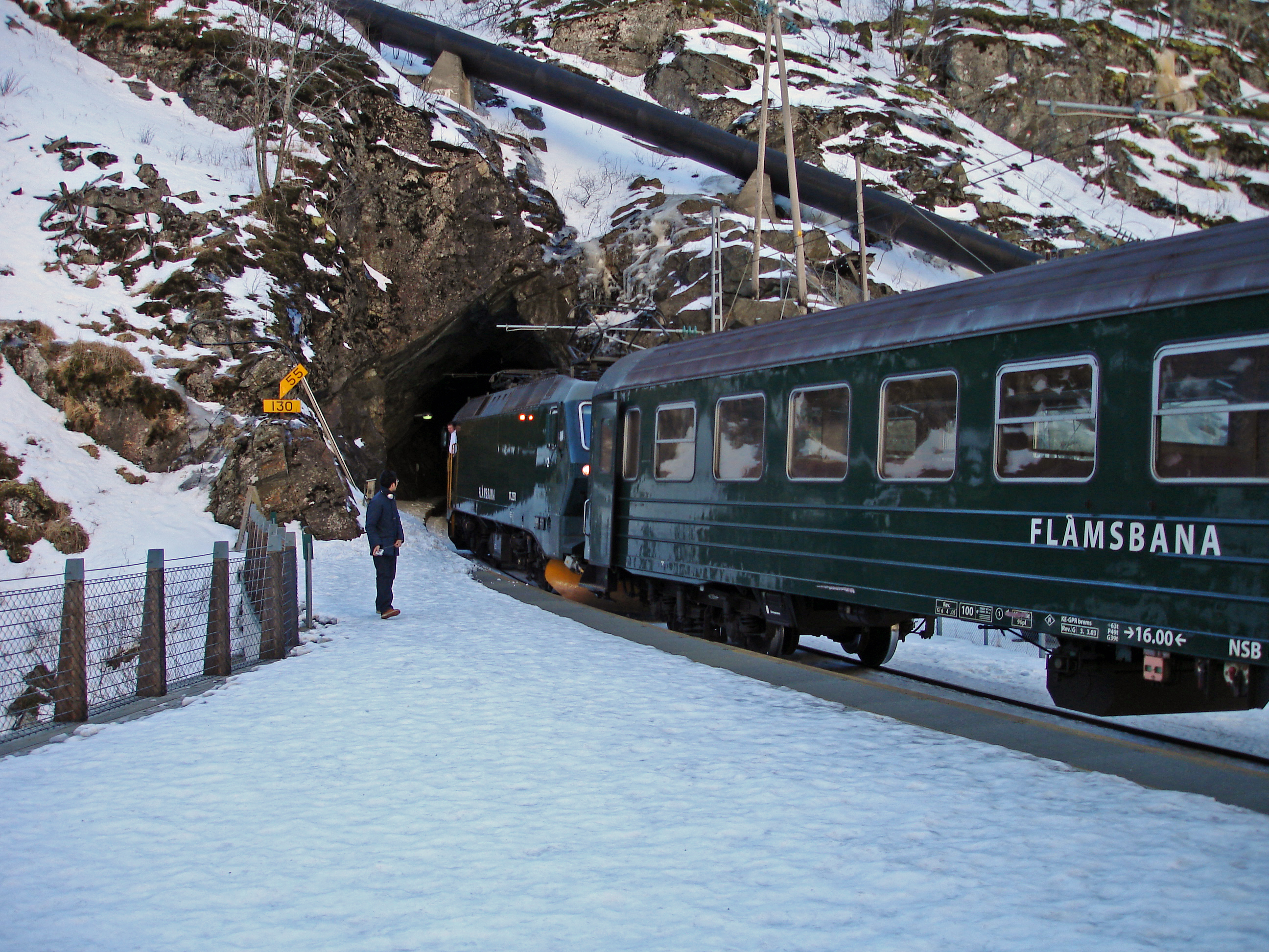 Flåmsbana ved Kjosfossen haldeplass